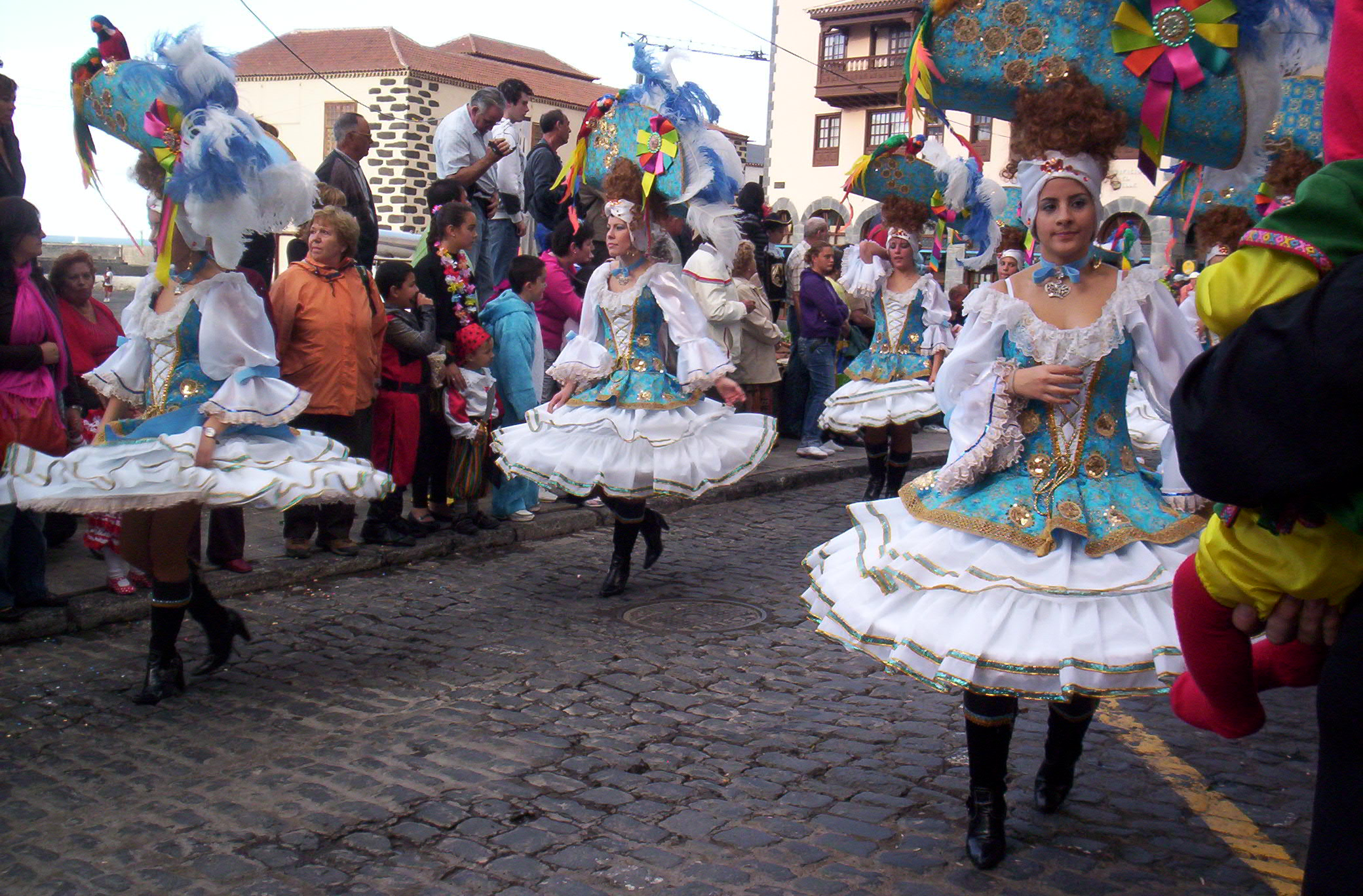 Coso del Carnaval 2008 de Puerto de la Cruz, Tenerife, Canarias